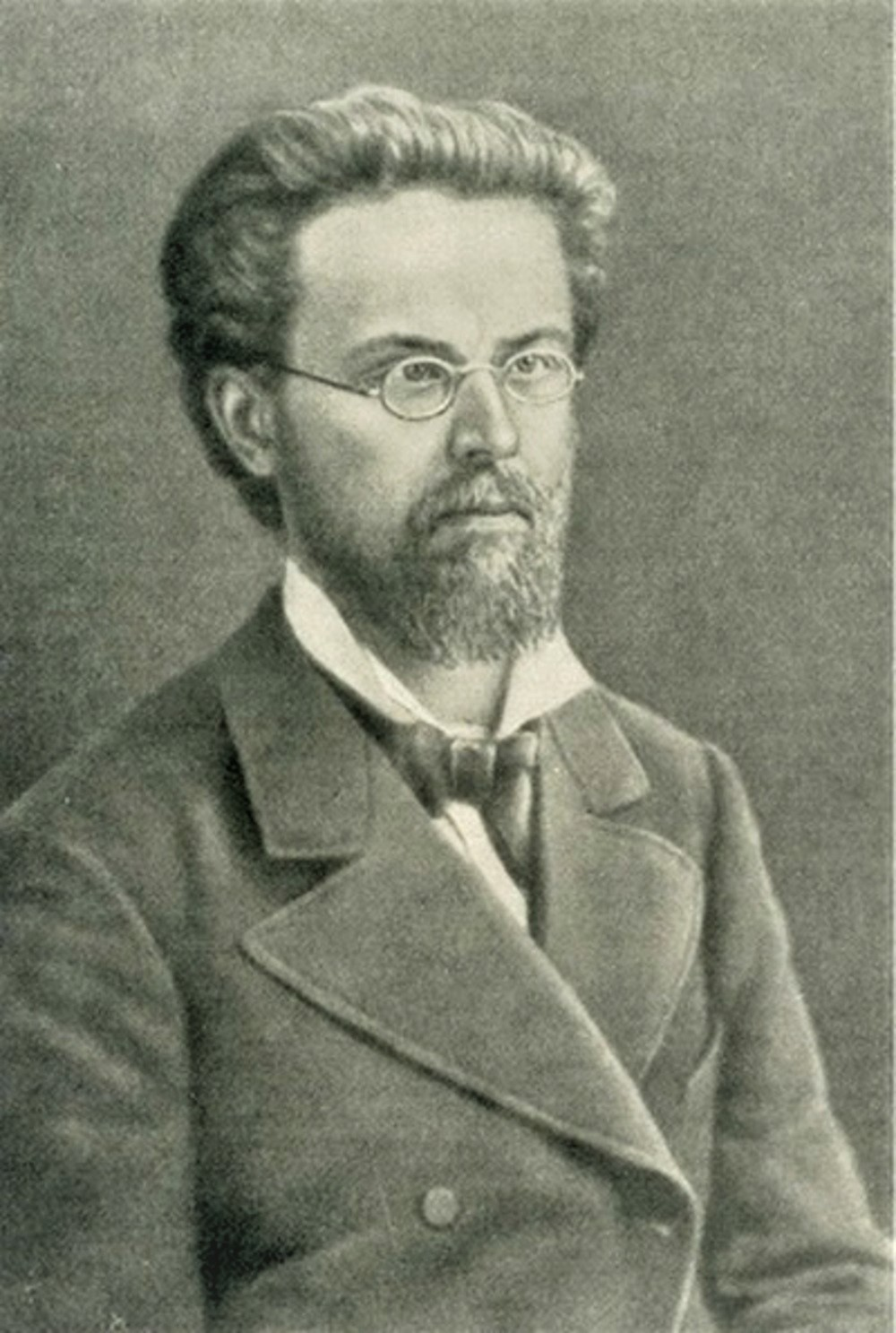 Nikolaj Aleksandrovič Morozov